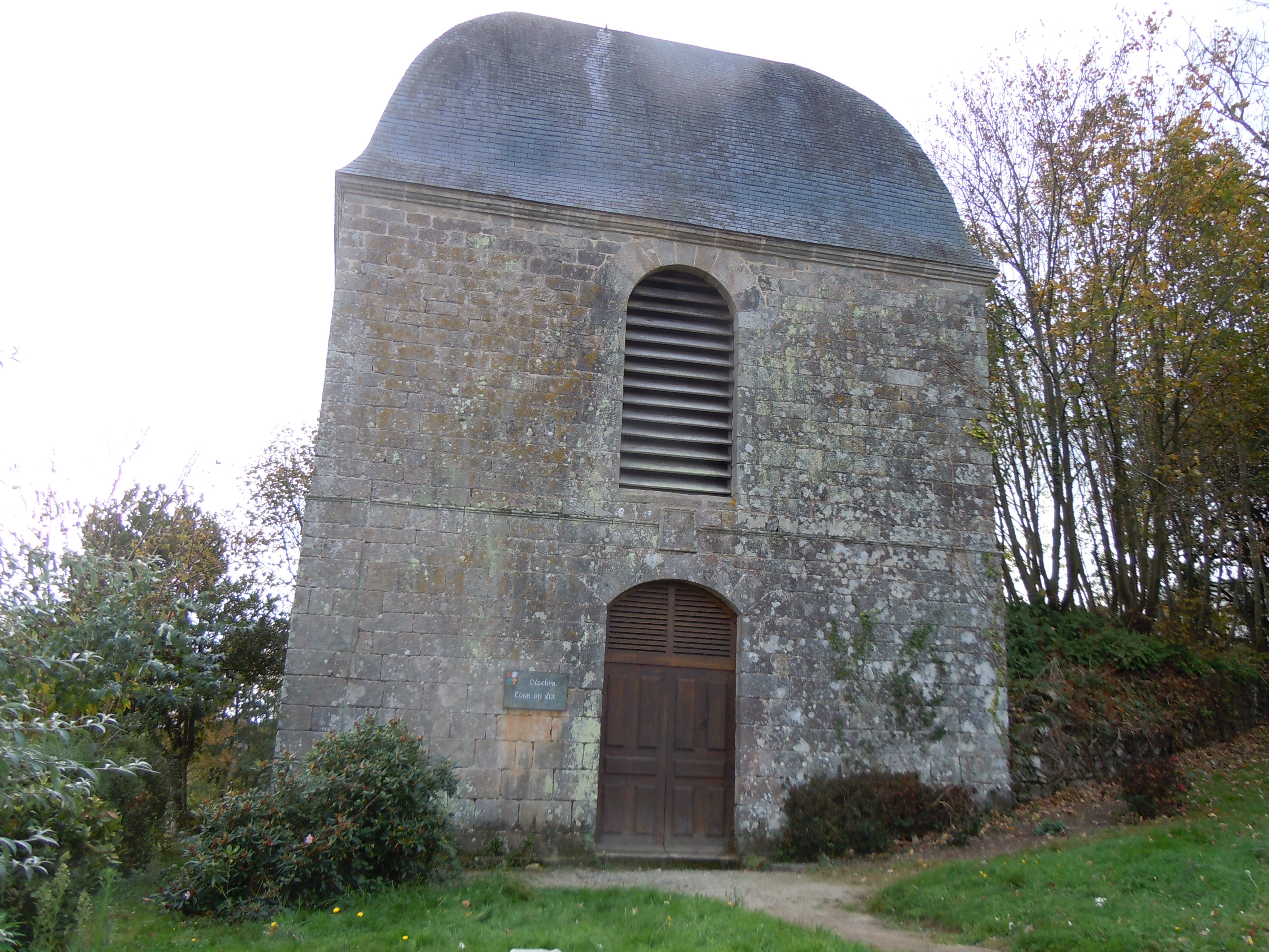 clocher-campanile situé au sommet de la colline Saint-Antoine à Guémené-sur-Scorff (Morbihan)